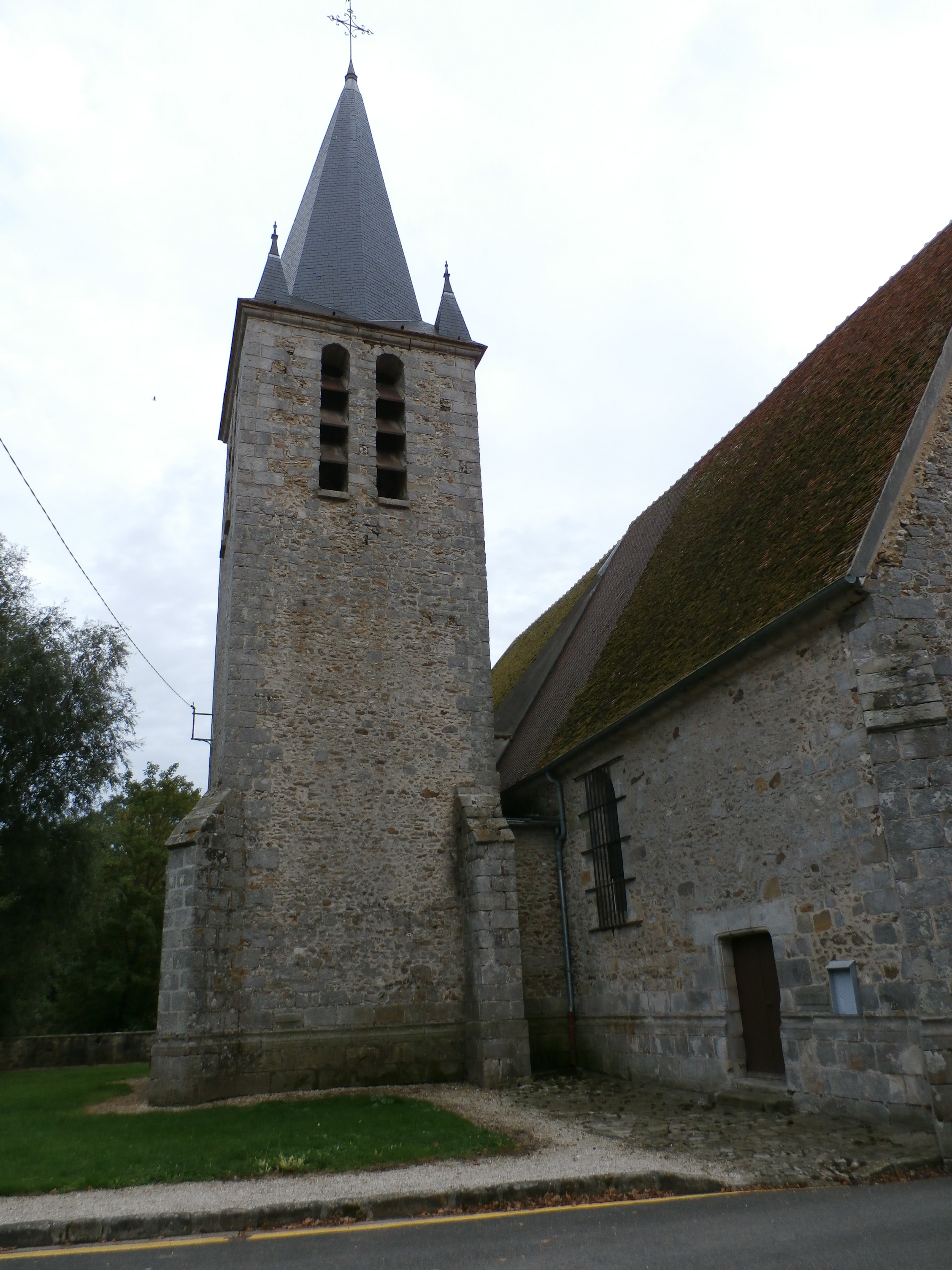 Église Saint-Aubin d'Ozouer-le-Repos (Inscrit) .